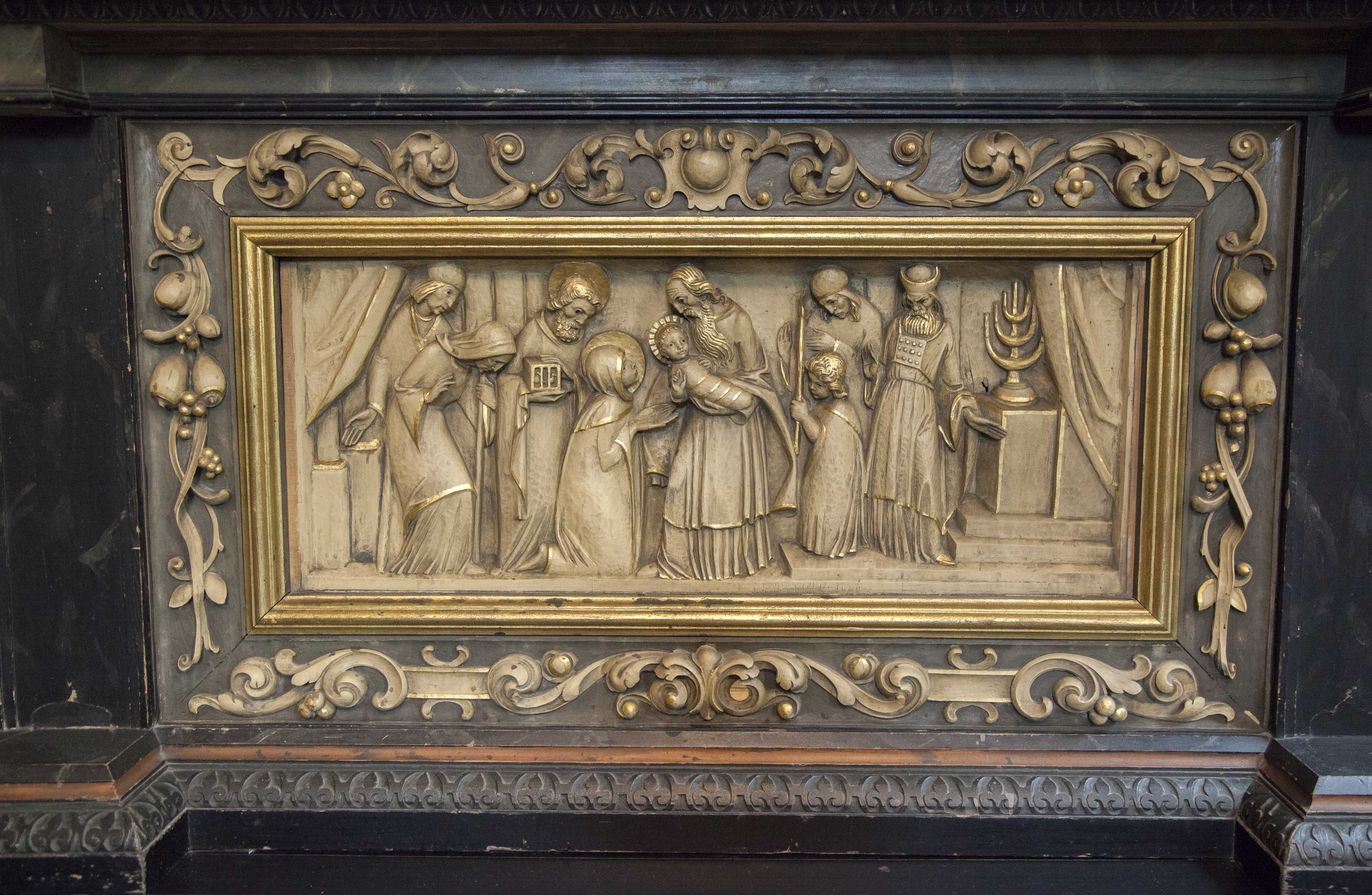 Bönkerskapelle Rheine - Altar - Darstellung des Herrn